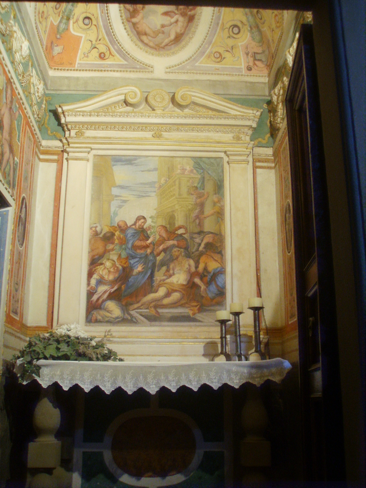 Villa_di_Artimino chapel Medici villa in Artimino